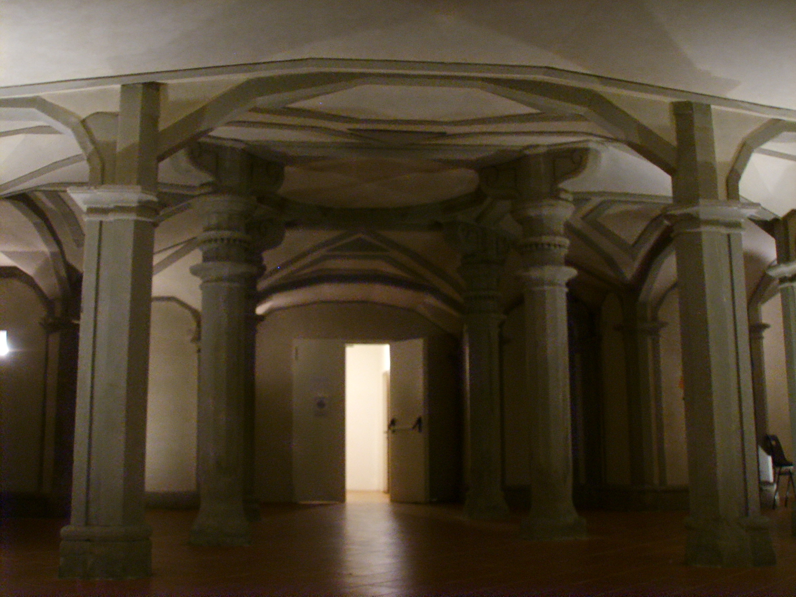 Santo stefano al ponte, cripta